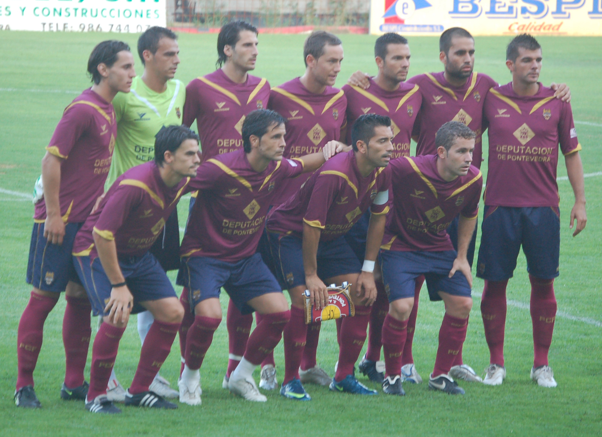 Equipo inicial do Pontevedra Club de Fútbol no Trofeo Cidade de Pontevedra 2009